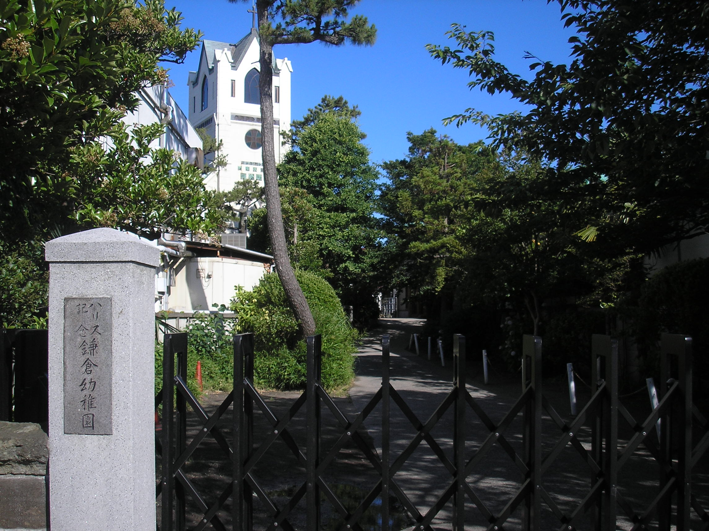 ハリス教会